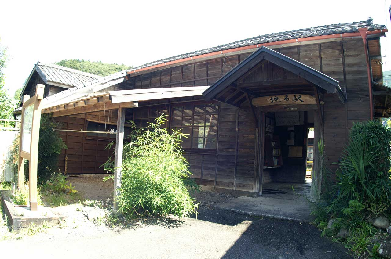 地名駅